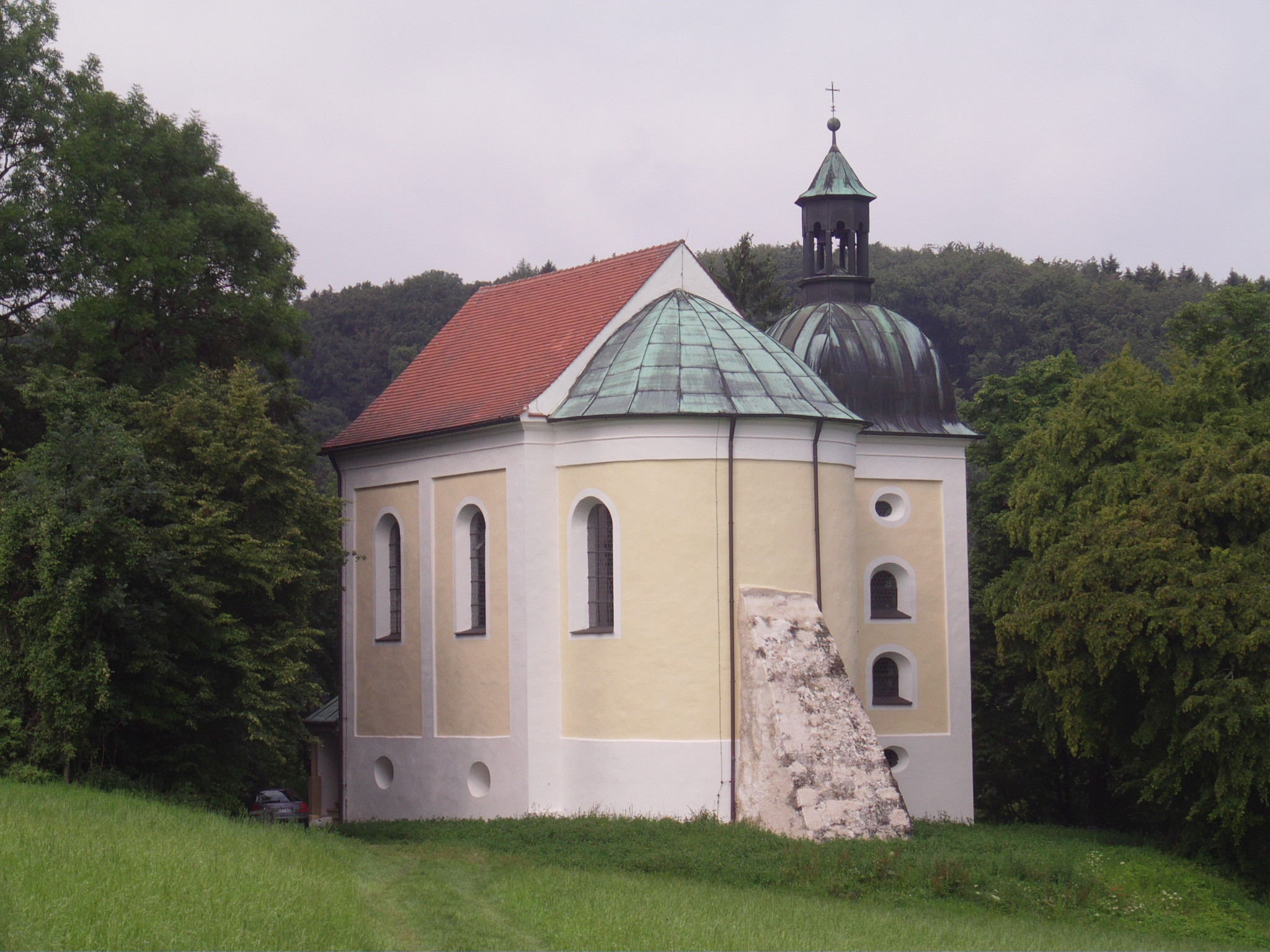 Frauenbergkapelle überhalb des Klosters